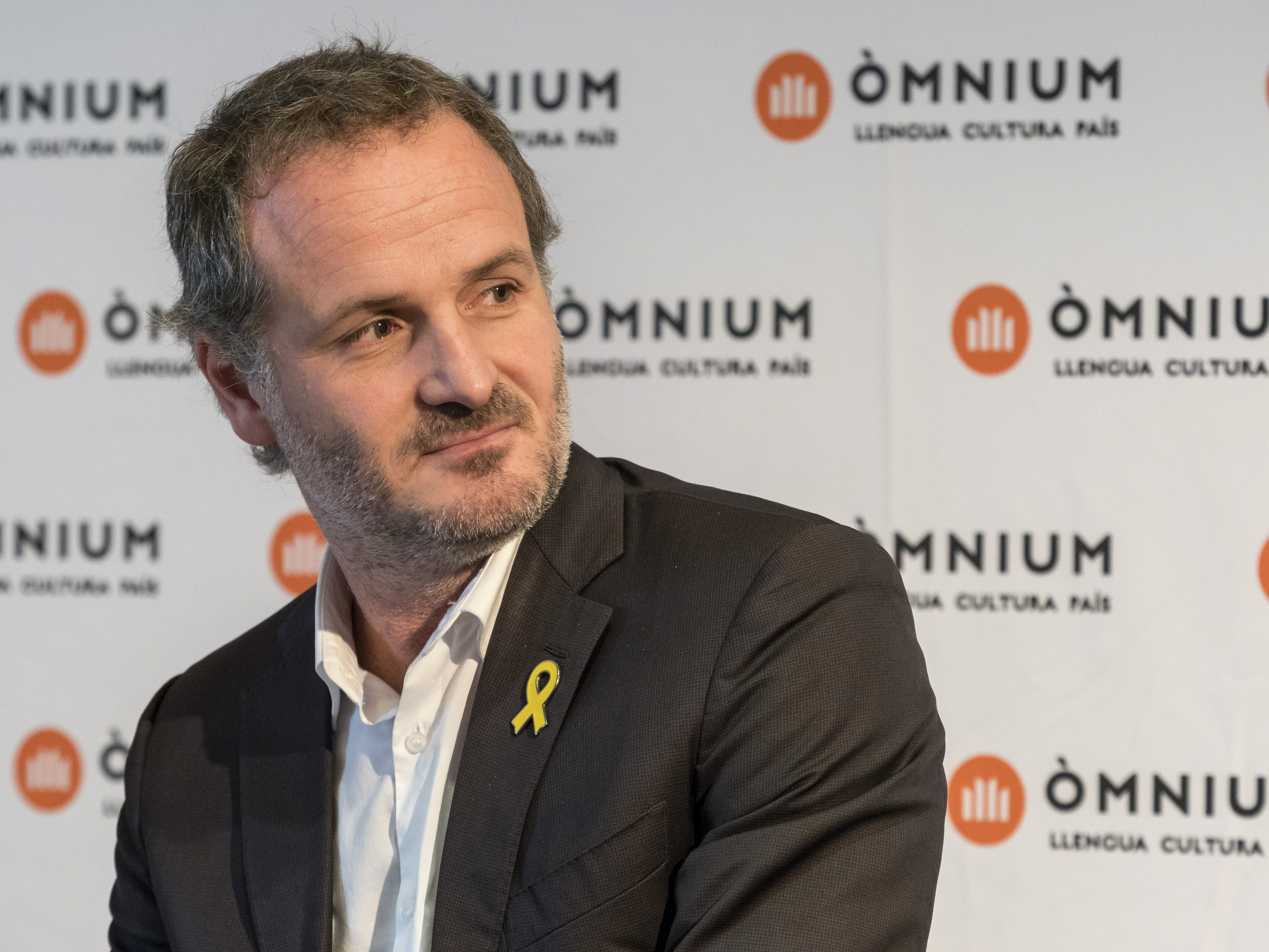 Jordi Cabré s'endú el 59è Premi Sant Jordi de novel·la amb 'Digues un desig'. El 21è premi Mercè Rodoreda de contes i narracions és per 'El país dels cecs' de Víctor García Tur i el mallorquí Carles Rebassa s’endú el premi Carles Riba de poesia que enguany arriba a la 60a edició, amb l’obra 'Sons bruts'. La maresmenca Núria Franquet guanya el 56è premi Josep M. Folch i Torres de novel·les per a nois i noies amb el seu primer llibre, La Liang dins del quadre. I Maite Carranza ha estat guardonada amb el 45è Premi Joaquim Ruyra de narrativa juvenil amb L’alè del drac.